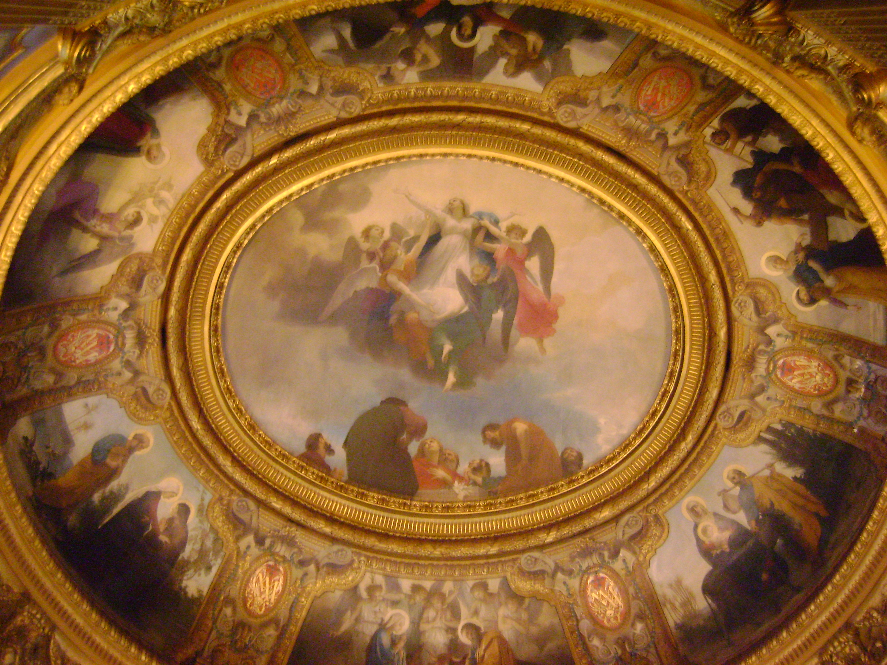 Cathédrale Saint-Louis de la Rochelle. Plafond